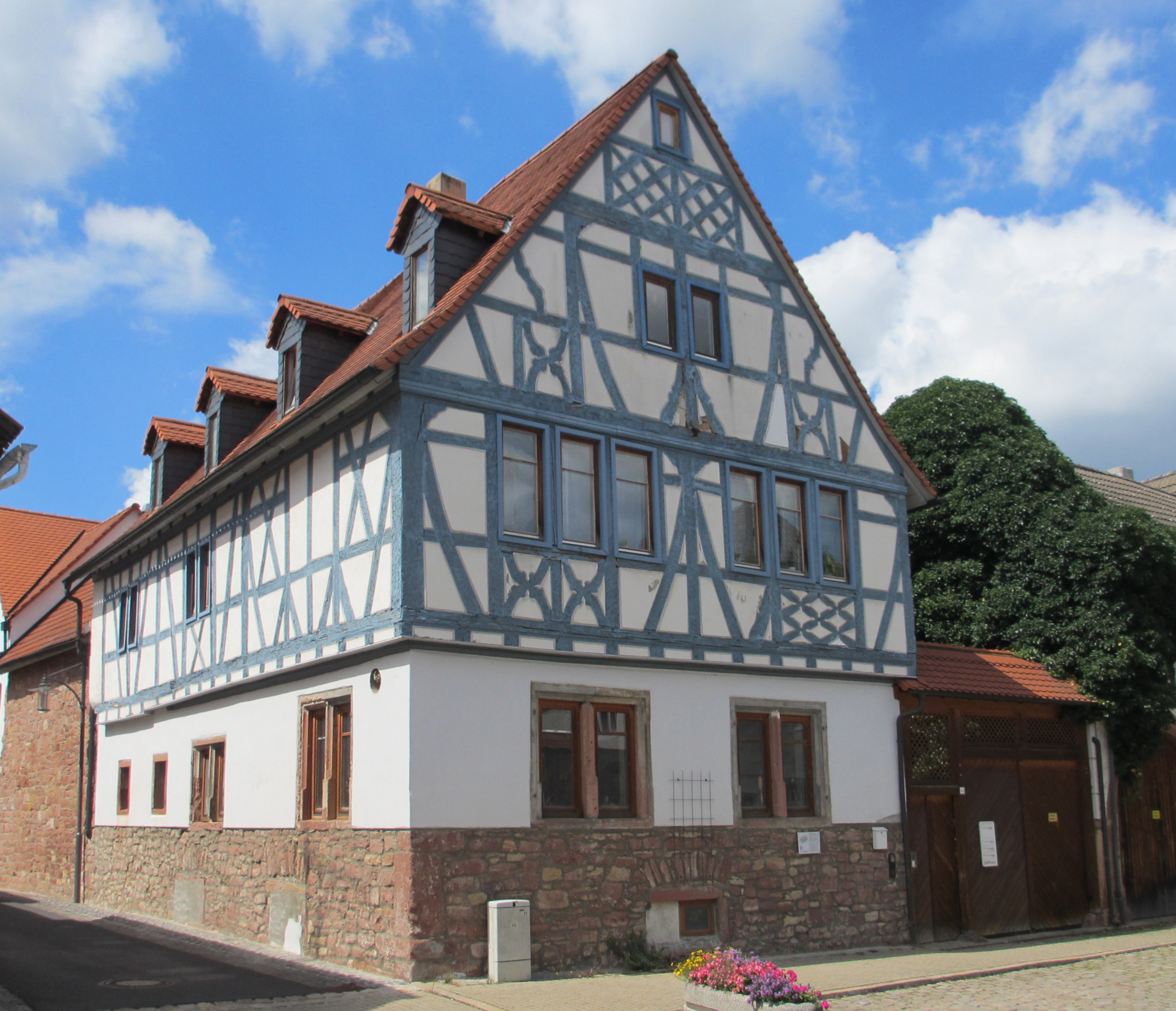 D-6-76-144-5 - Niedernberg, Hauptstraße 44